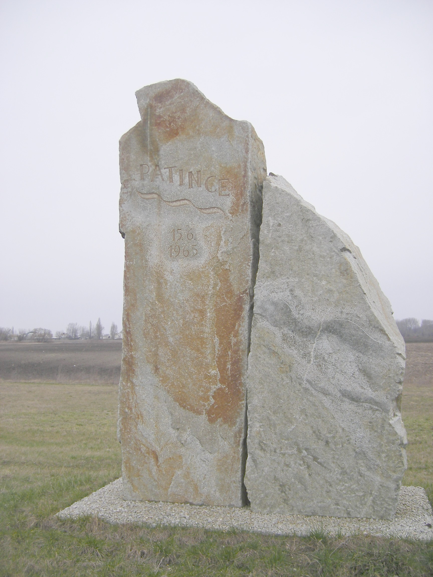 Pat - az 1965-ös árvíz emlékműve